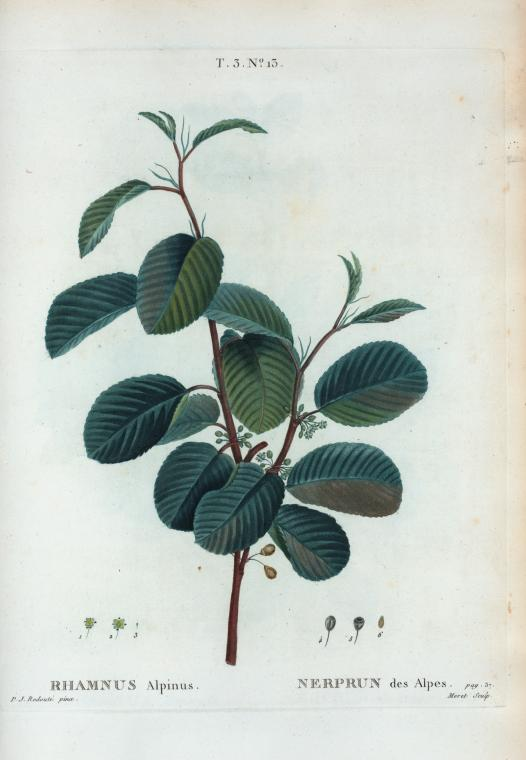 Rhamnus Alpinus = Nerprun des Alpes.